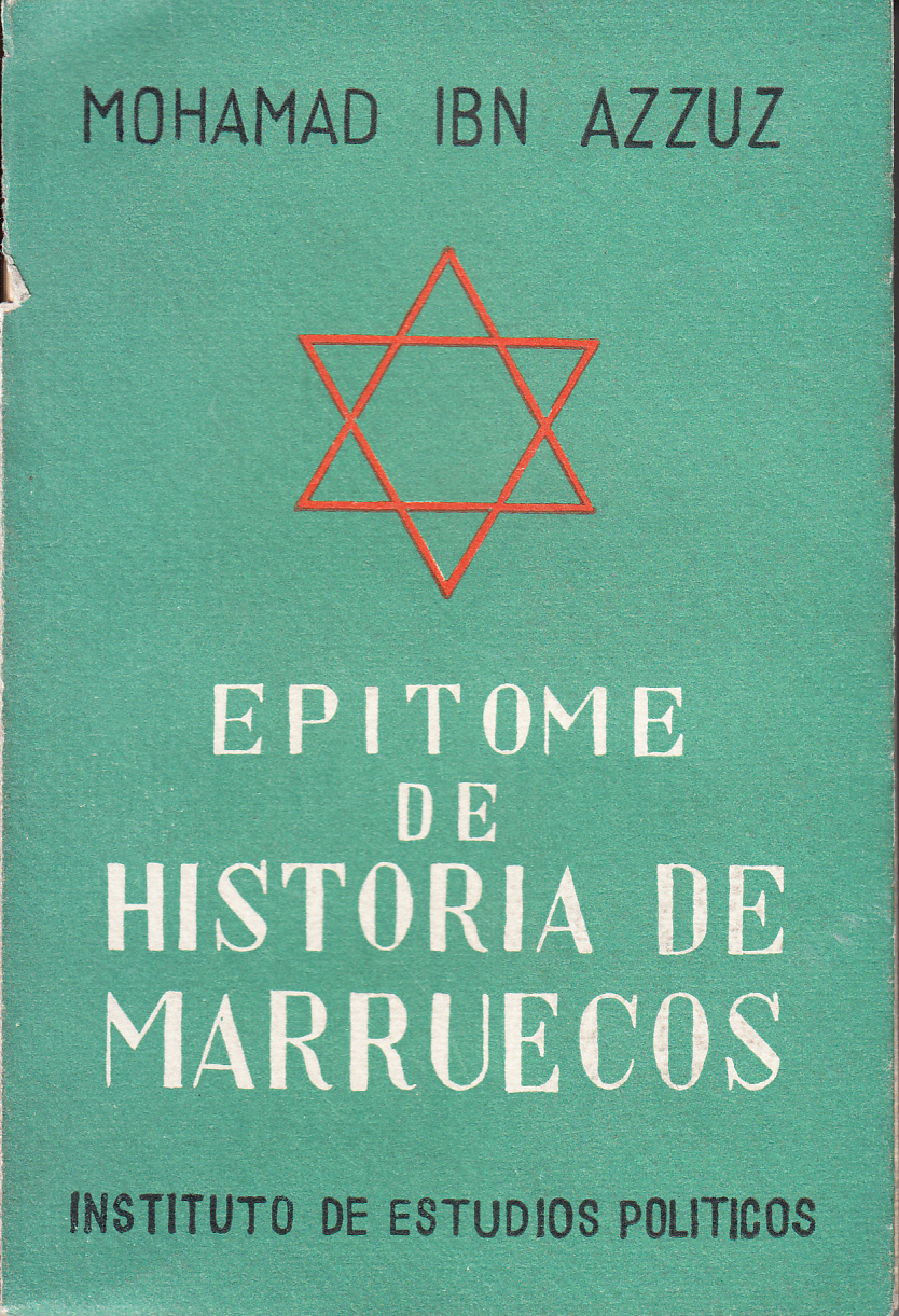 Portada del libro